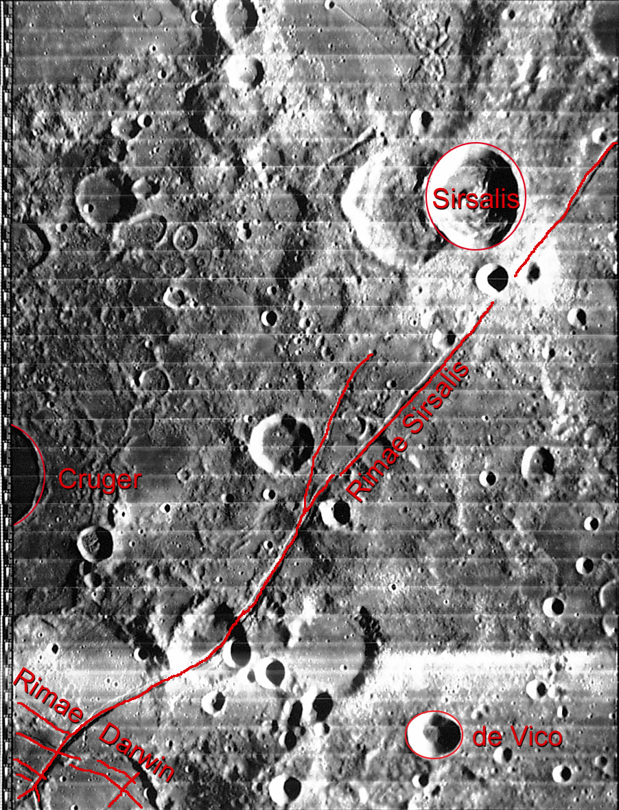 德维克陨石坑的周边图